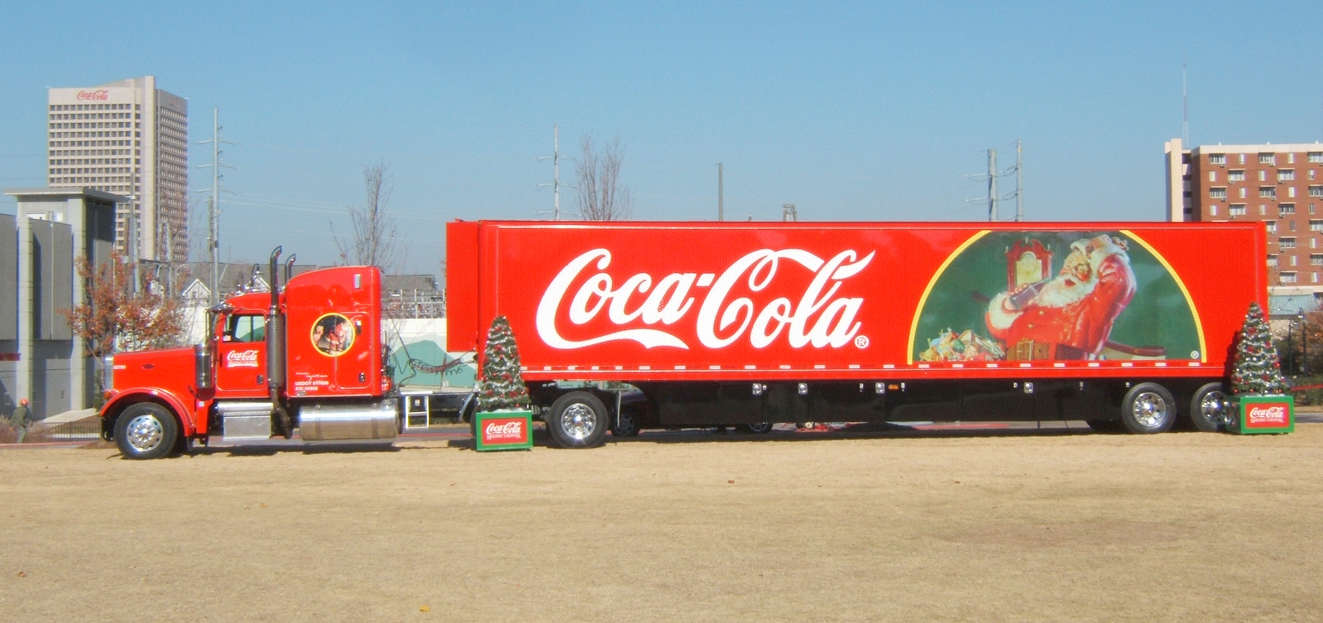 Camion Coca-Cola (le tracteur est de marque Peterbilt) devant le "World of Coca-Cola" à Atlanta à l'approche de Noël, avec, au fond à gauche, le siège mondial de Coca-Cola.